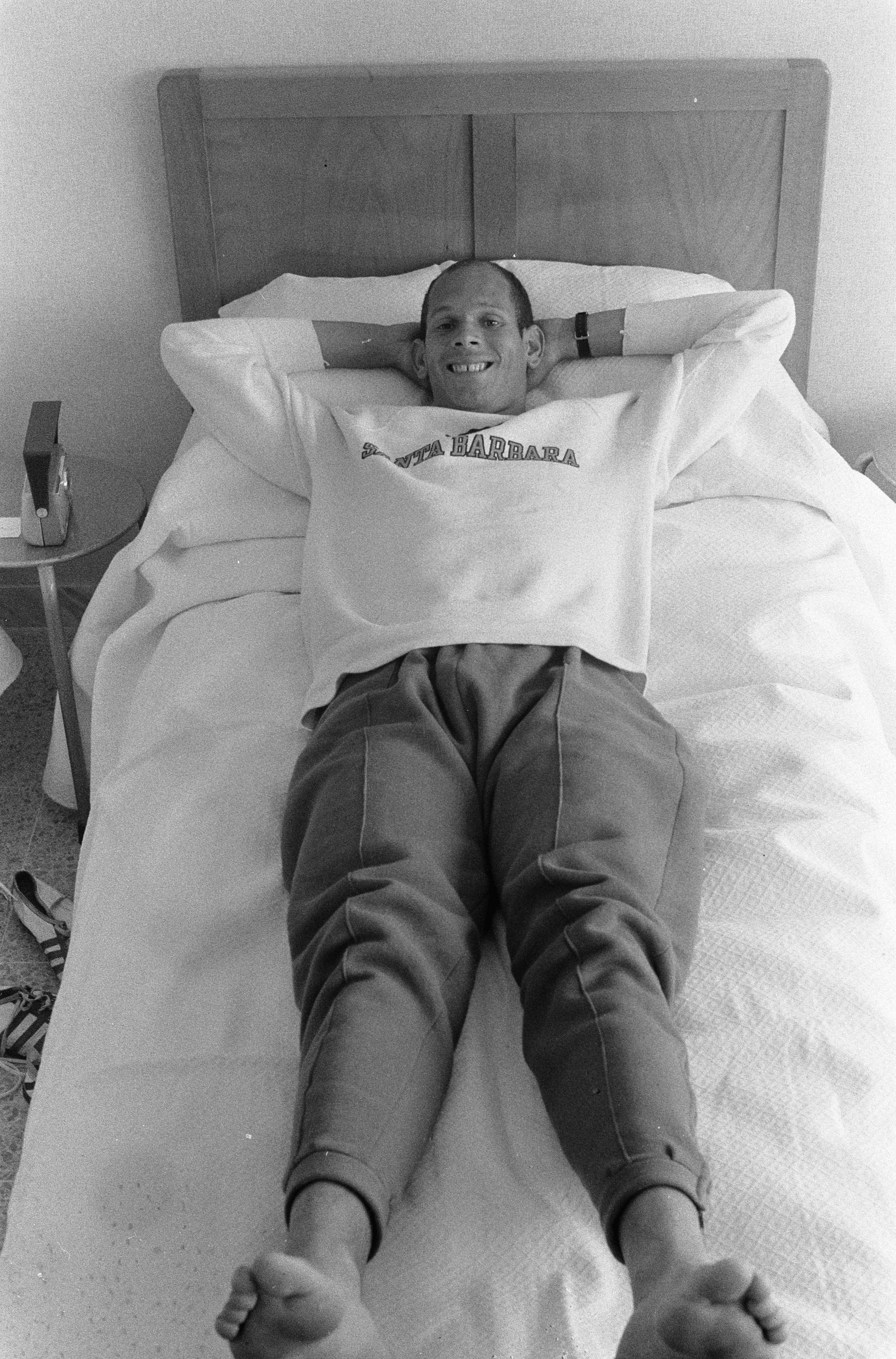 Collectie / Archief : Fotocollectie Anefo Reportage / Serie : [ onbekend ] Beschrijving : Olympische Spelen te Rome, Henk Visser in zijn kamer Annotatie : Henk Visser was een versrpinger Datum : 23 augustus 1960 Locatie : Rome Trefwoorden : atleten Persoonsnaam : Visser, Henk Fotograaf : Pot, Harry / Anefo Auteursrechthebbende : Nationaal Archief Materiaalsoort : Negatief (zwart/wit) Nummer archiefinventaris : bekijk toegang 2.24.01.05 Bestanddeelnummer : 911-5256